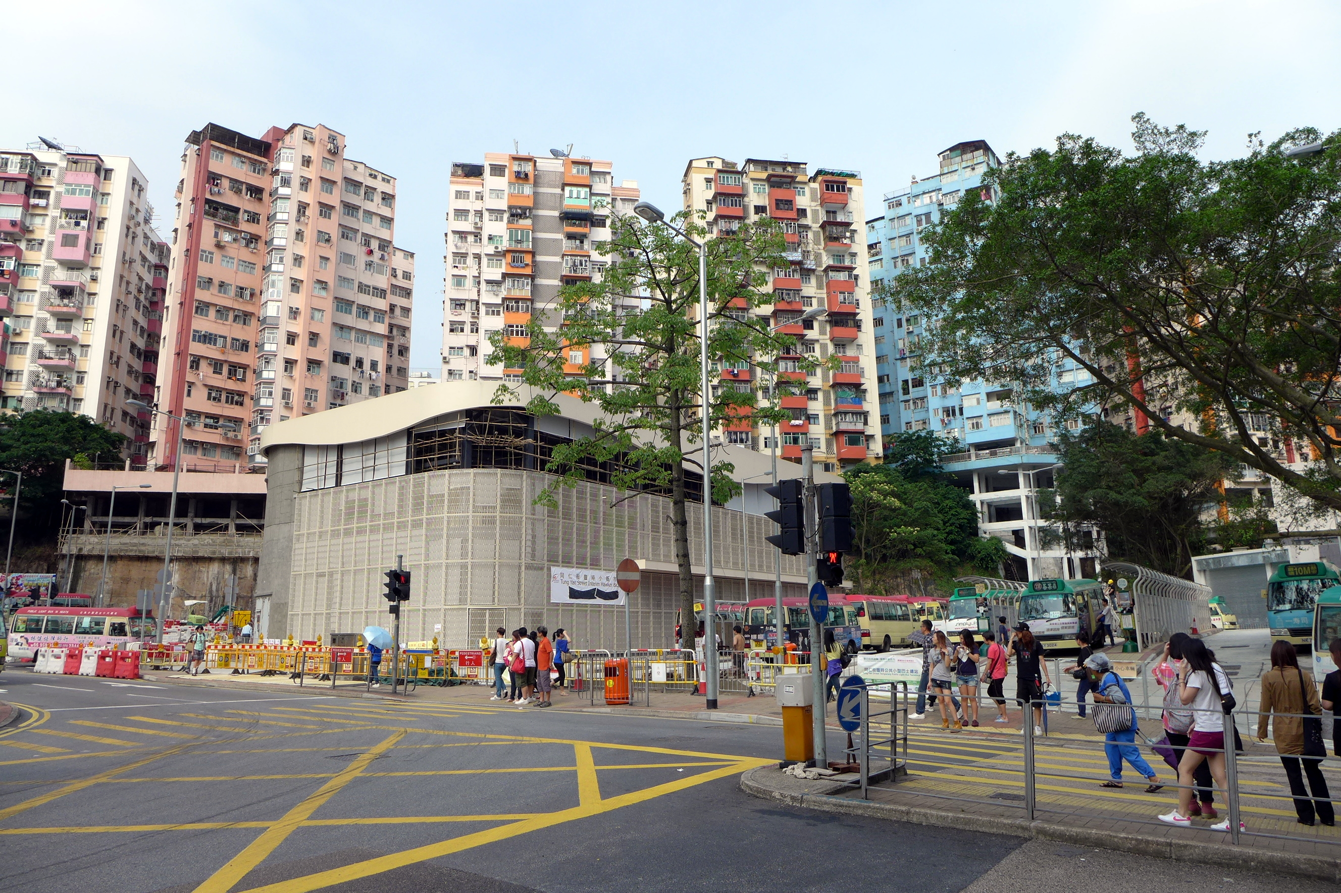 Tung Yan Street Temp Market 同仁街臨時小販市場